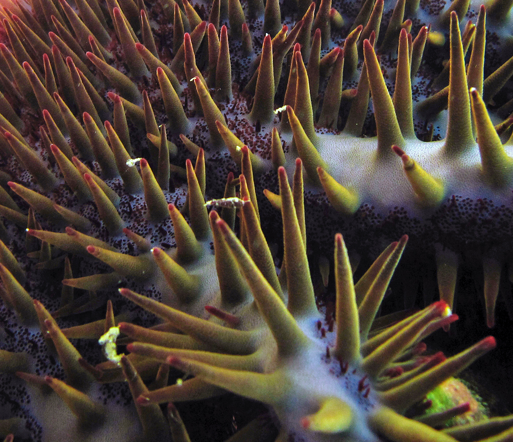 Détail des épines d'une étoile de mer Acanthaster Planci observée à la Réunion, avec sécretion de venin.